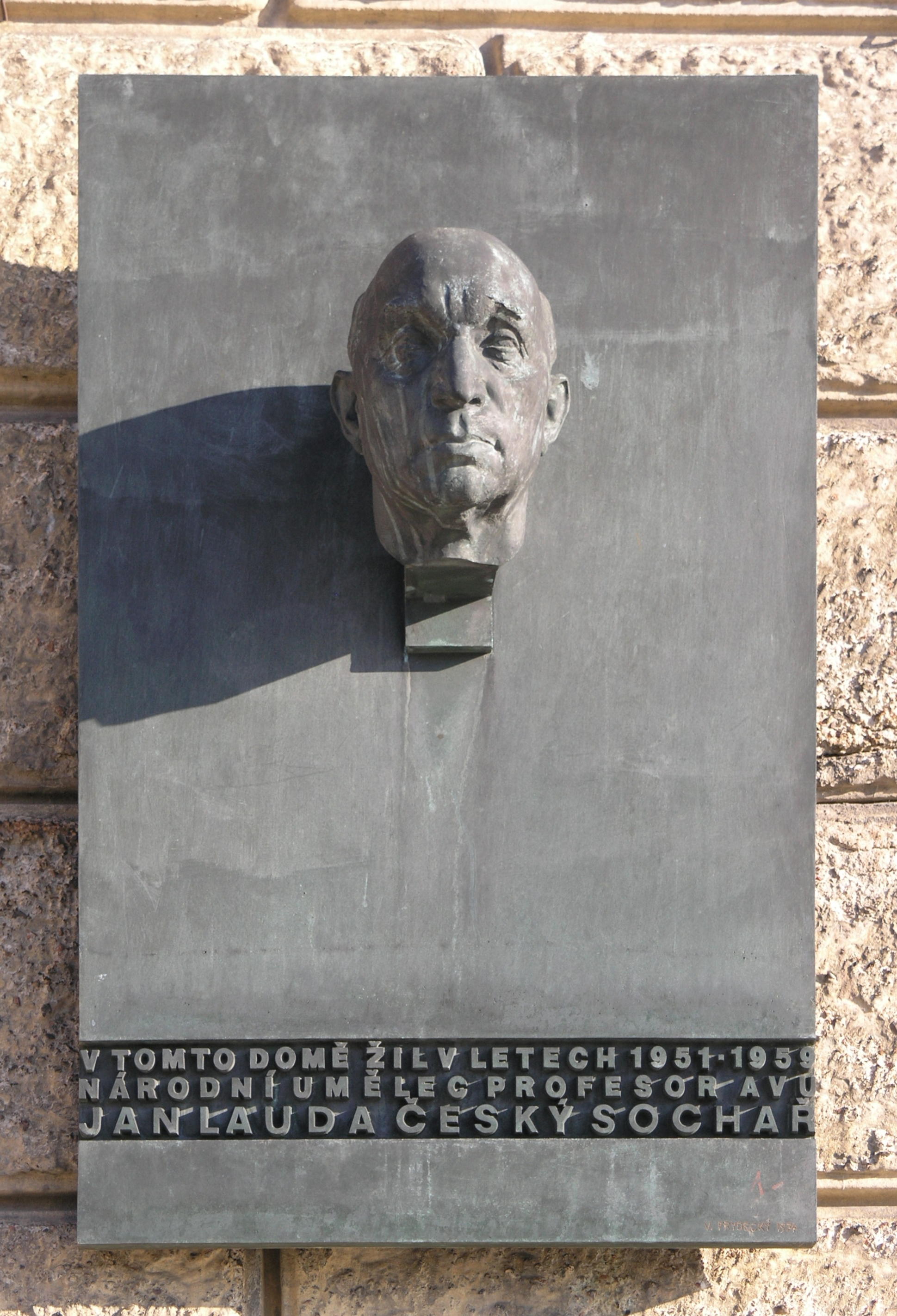 Praha, Hradčanské náměstí